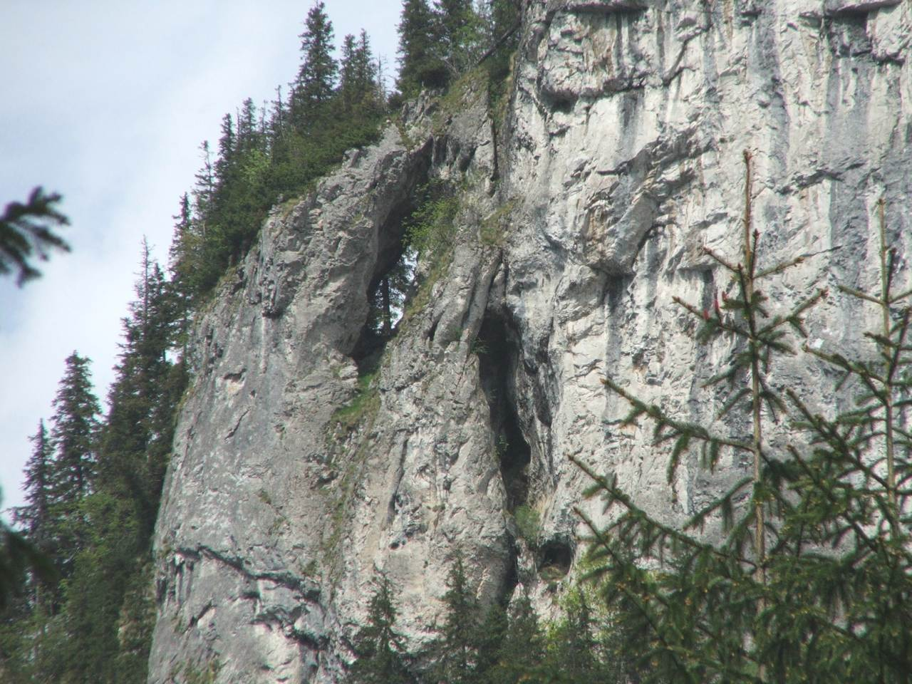 Zbójnickie Okna w Dolinie Kościeliskiej